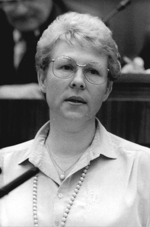 ADN-ZB/Mittelstädt 17.6.86 Berliner Volkskammertagung In der Diskussion sprach für die Fraktion des DPD die Abgeordnete Eva Rohmann.